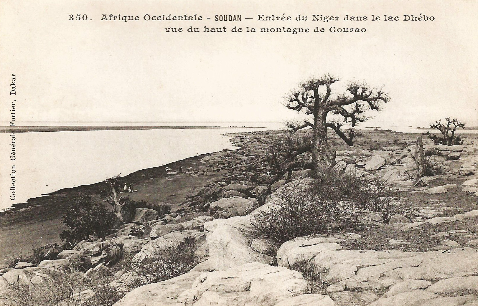 François-Edmond Fortier, Entrée du Niger dans le lac Dhébo vue du haut de la montagne Gourao. Afrique Occidentale - Soudan.